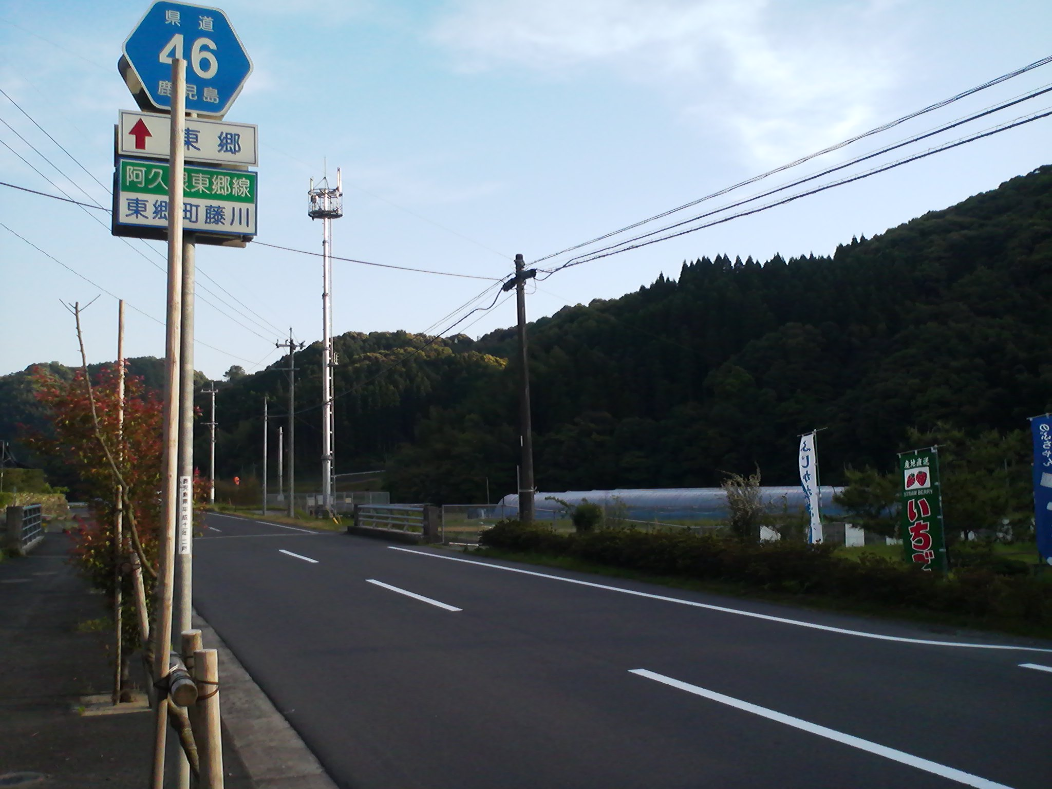 鹿児島県道46号阿久根東郷線の薩摩川内市東郷町藤川付近。